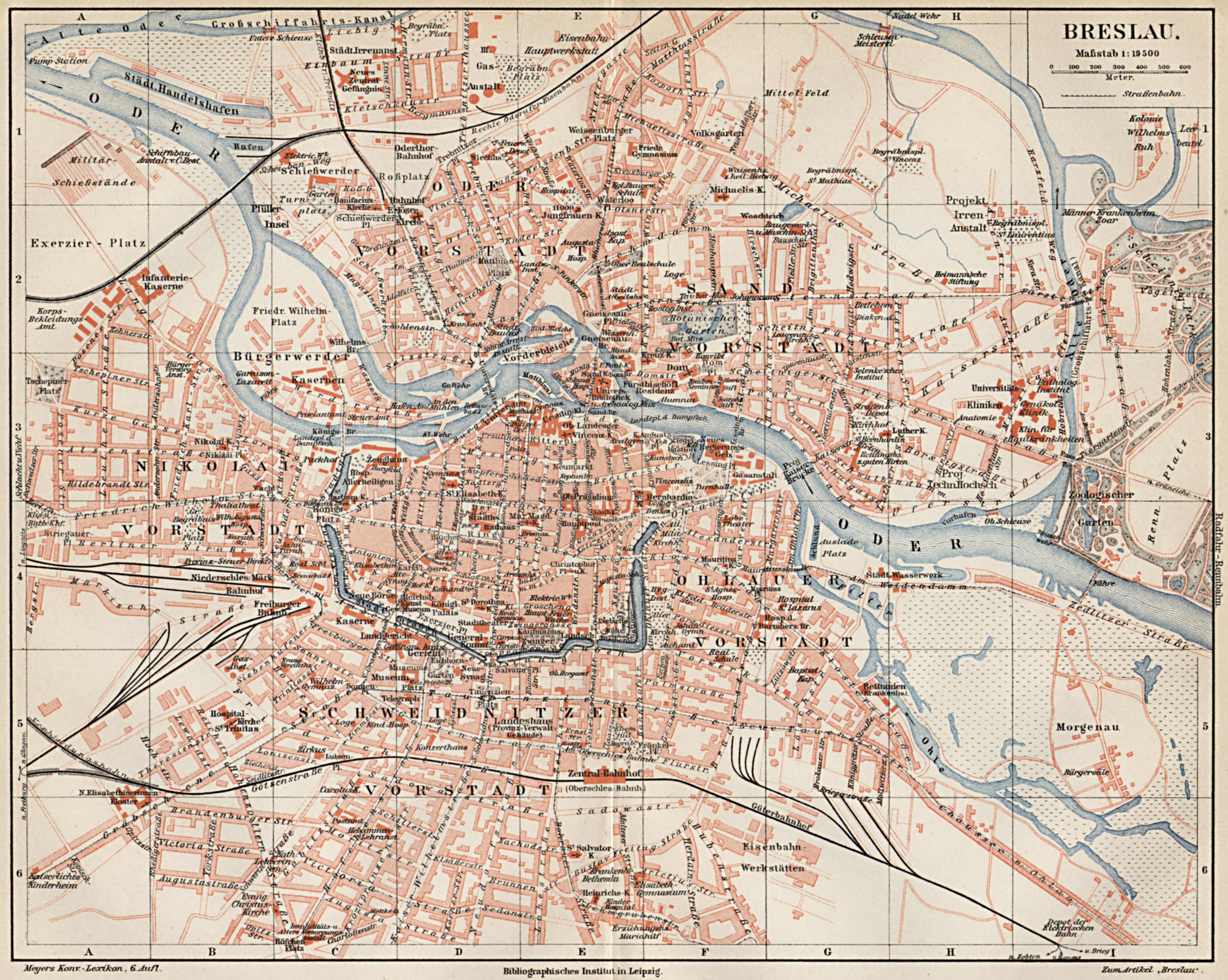 Breslau Stadtplan